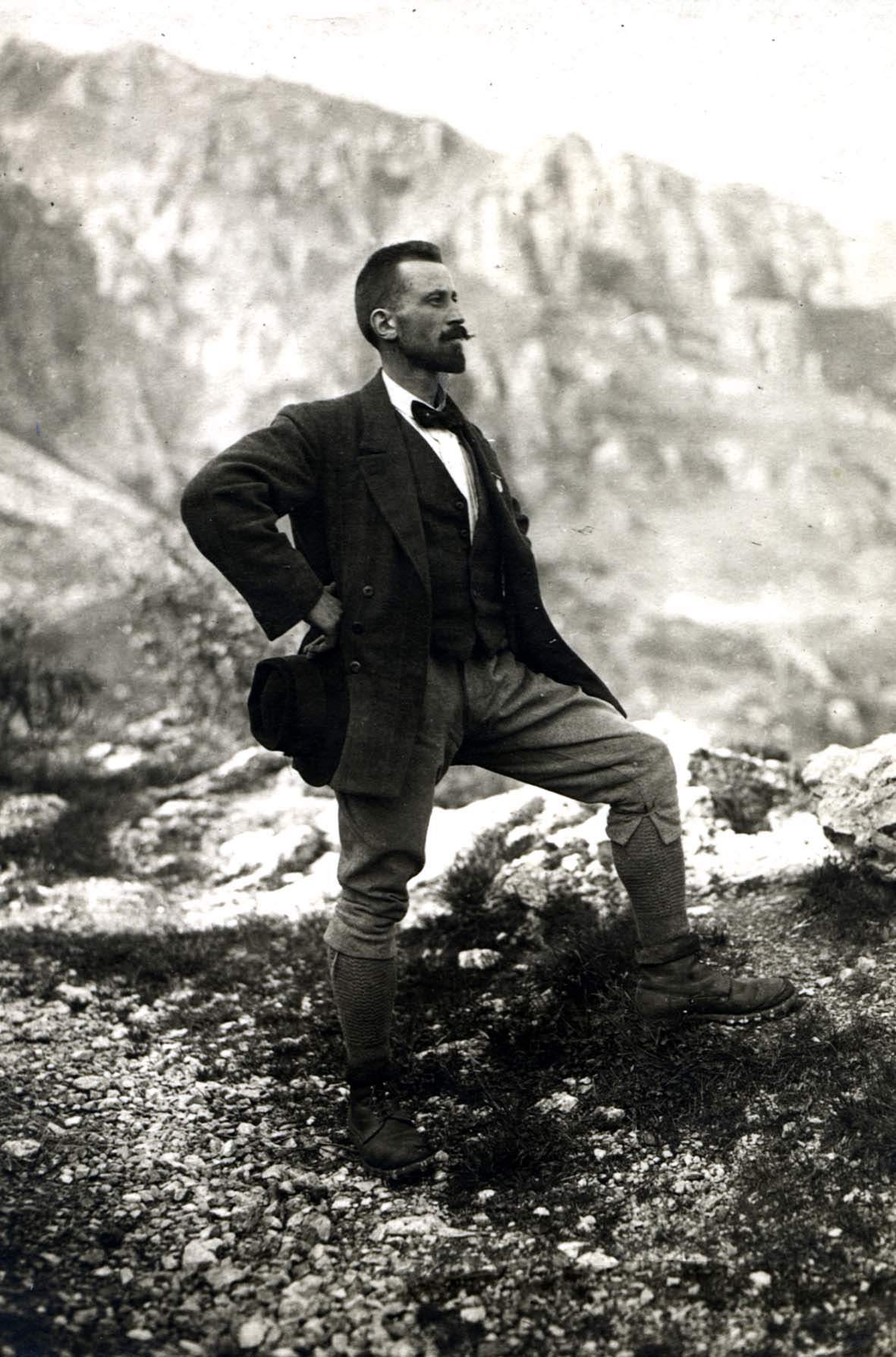 Eugenio Fasana in Grignetta